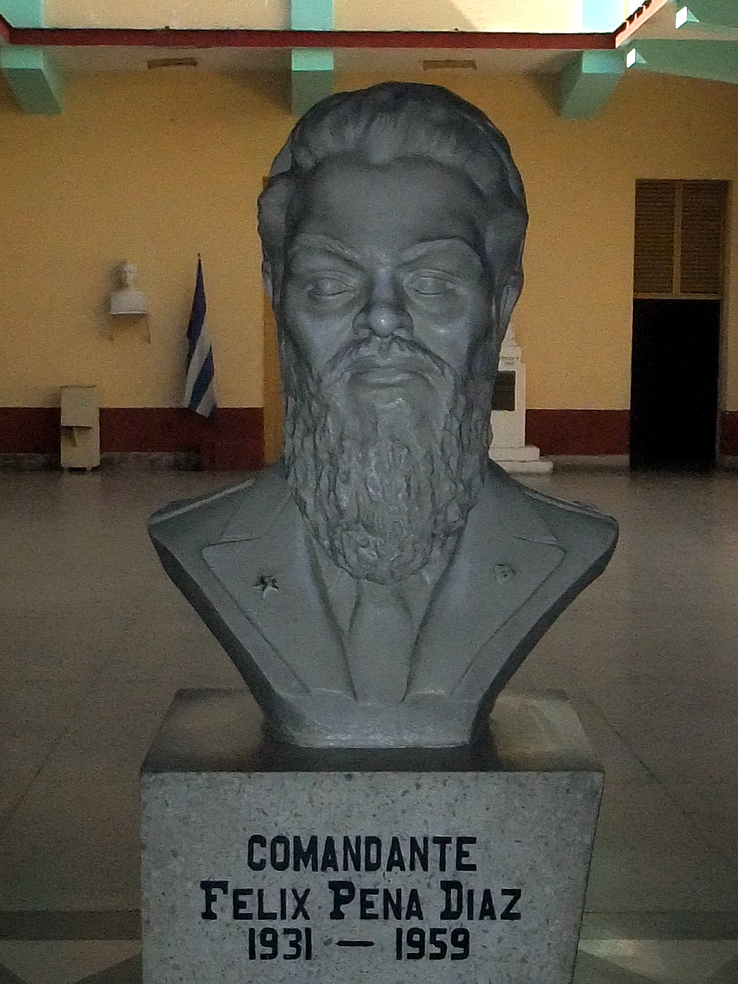 Büste des Revolutionshelden, Studentenführers und Guerillakommandanten Félix Pena in der nach ihm benannten Handelsschule in Santiago de Cuba